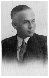 Олександр Цинкаловський в часи науки.